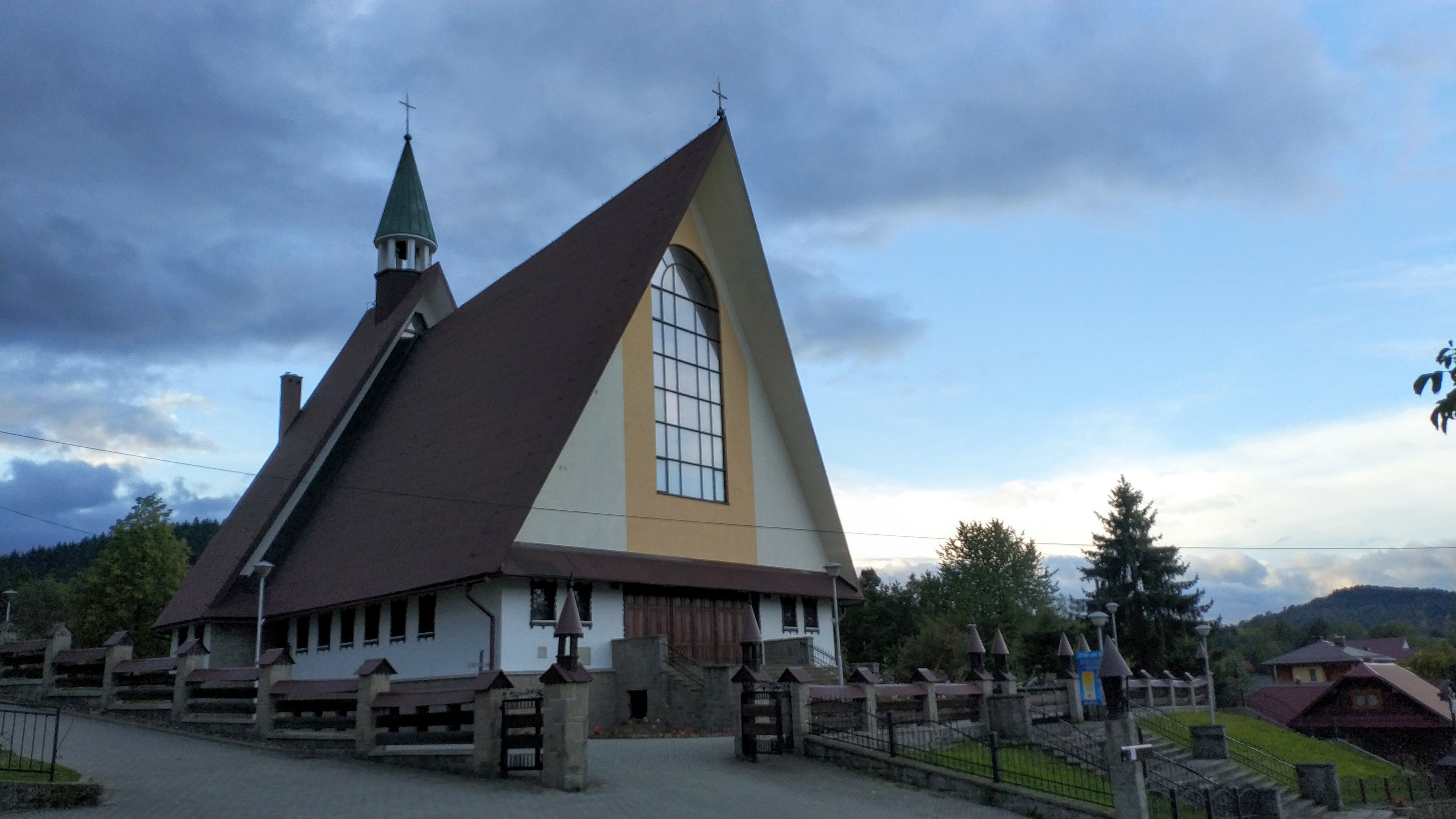 Widok na Kosciół pw. Matki Boskiej Królowej Polski w Pewel Slemieńska